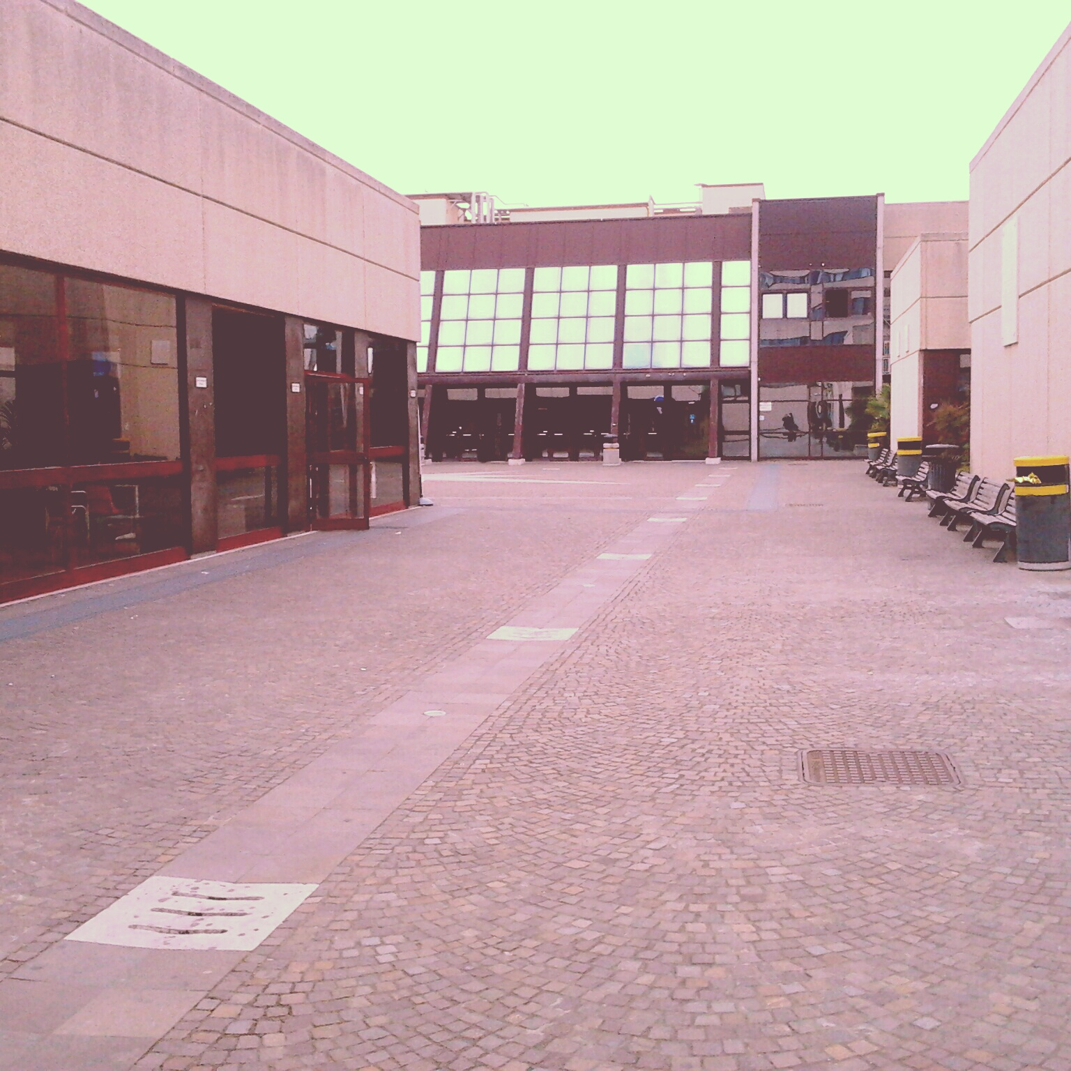 Ingresso principale della facoltà di Lettere dell'Università degli Studi di Roma Tor Vergata